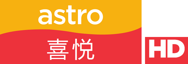 Logo saluran Astro Xi Yue HD